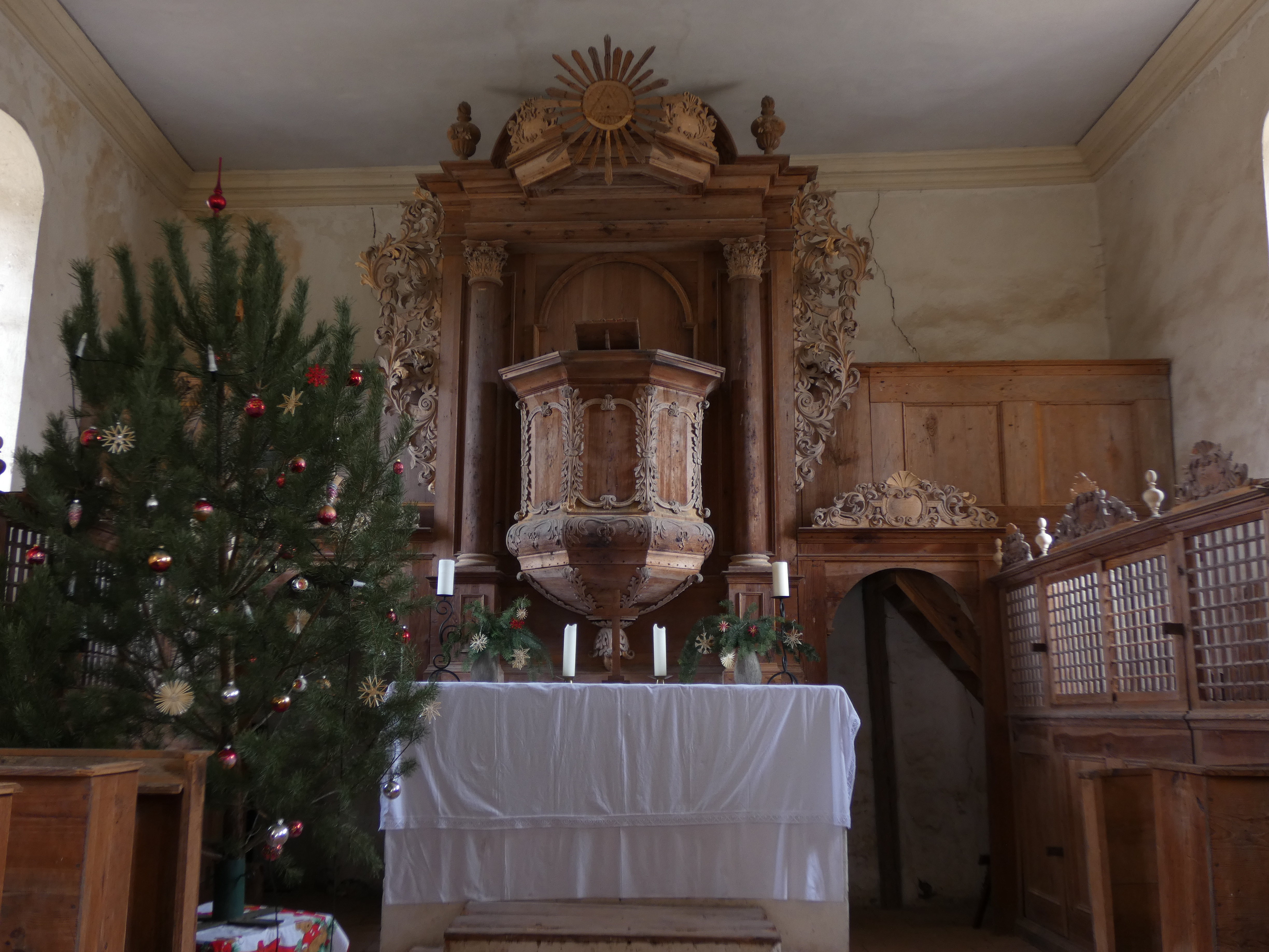 Dorfkirche Mahlenzien innen